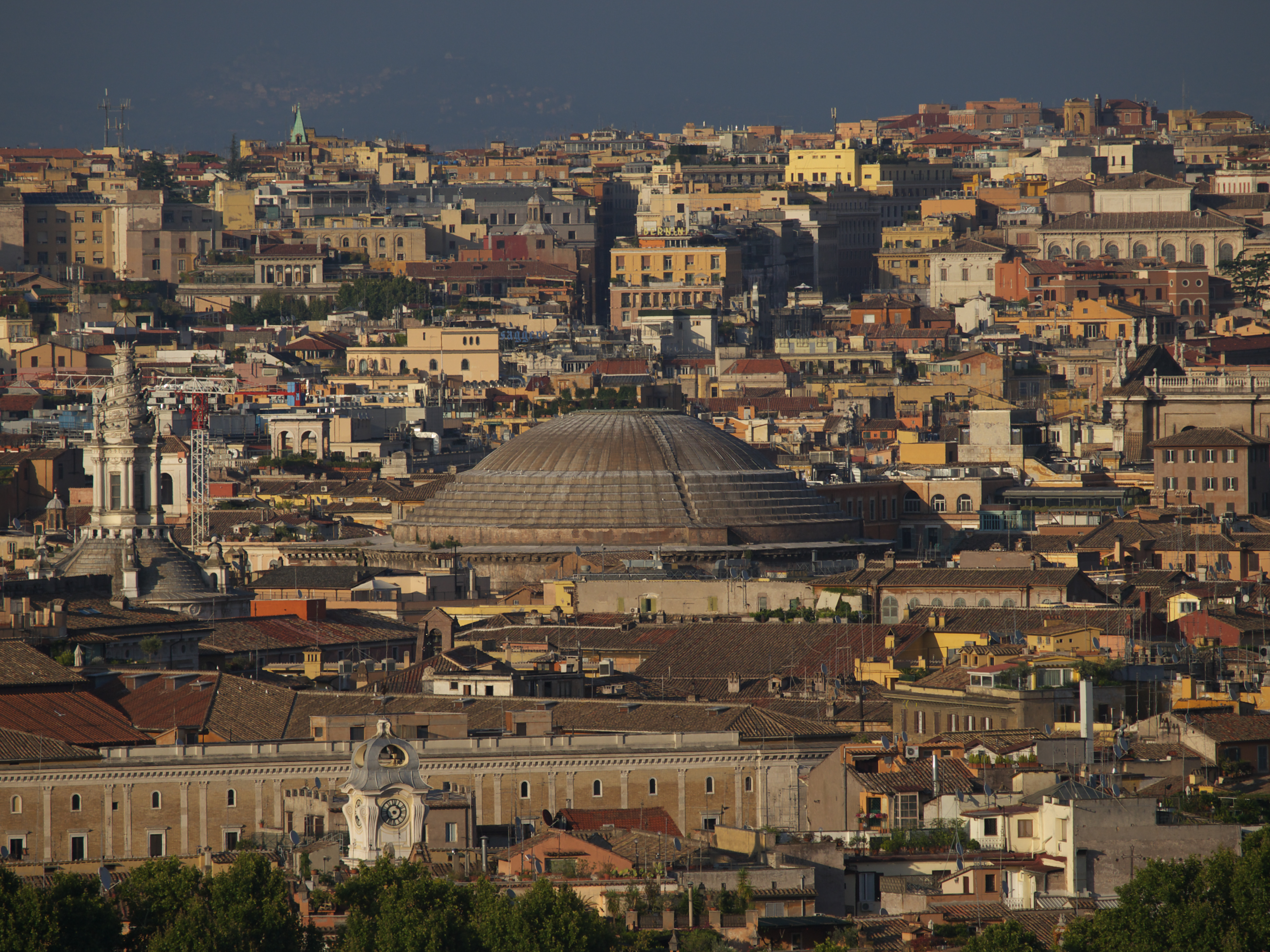 Pantheon in Rom vom Gianicolo